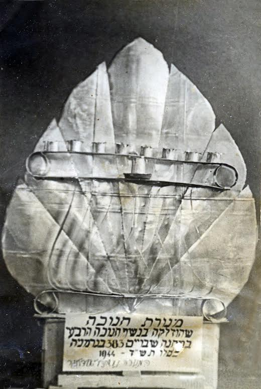 מנורת חנוכה שהוכנה מקופסאות שימורים והודלקה בנשף חנוכה דצמבר 1944 במחנה השבויים 383 בגרמניה על ידי אנדרה וידלינגר (אברהם דייגי), מפדויי השבי. מתוך עזבונו